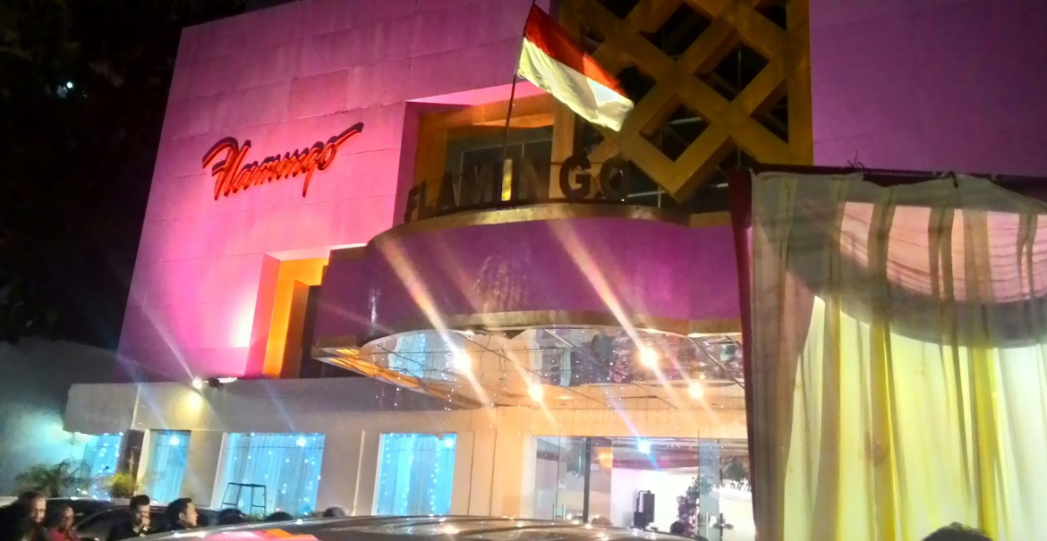 Flamingo Surabaya